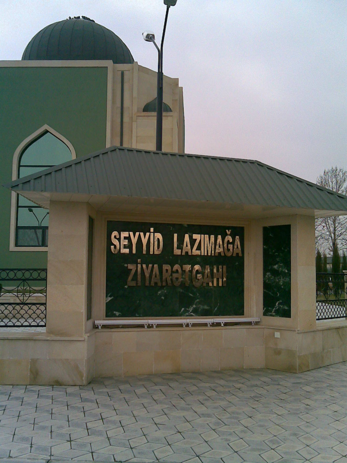 Seyid Lazım Ağa ziyarətgahı